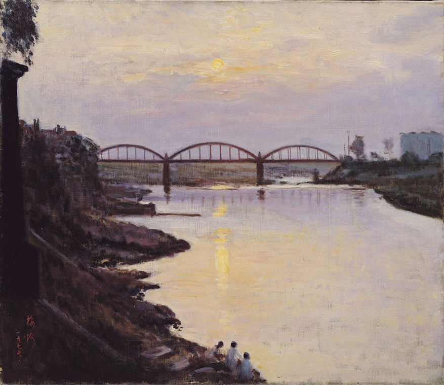 中文（台灣）: 三峽春曉,1977,油彩 畫布